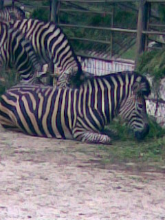 zebra